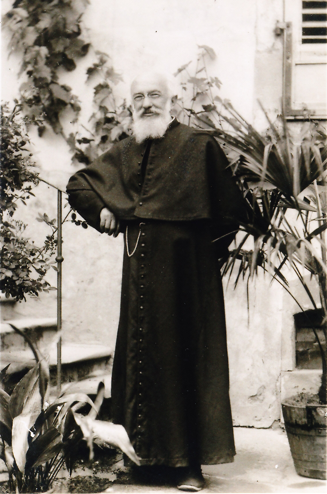 Abbé Paul Idoux, vers 1938